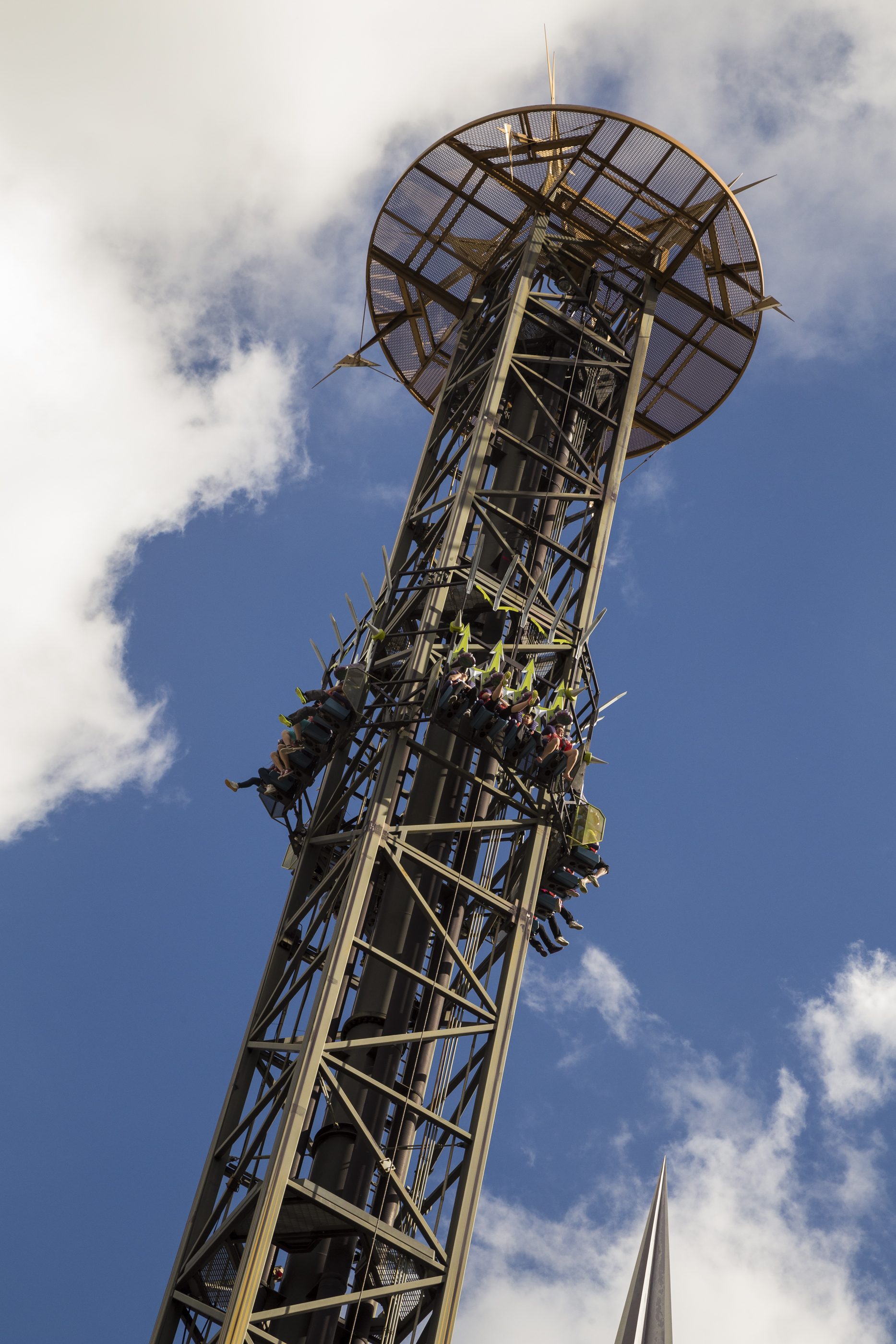 Florida Center, Orlando, FL, USA